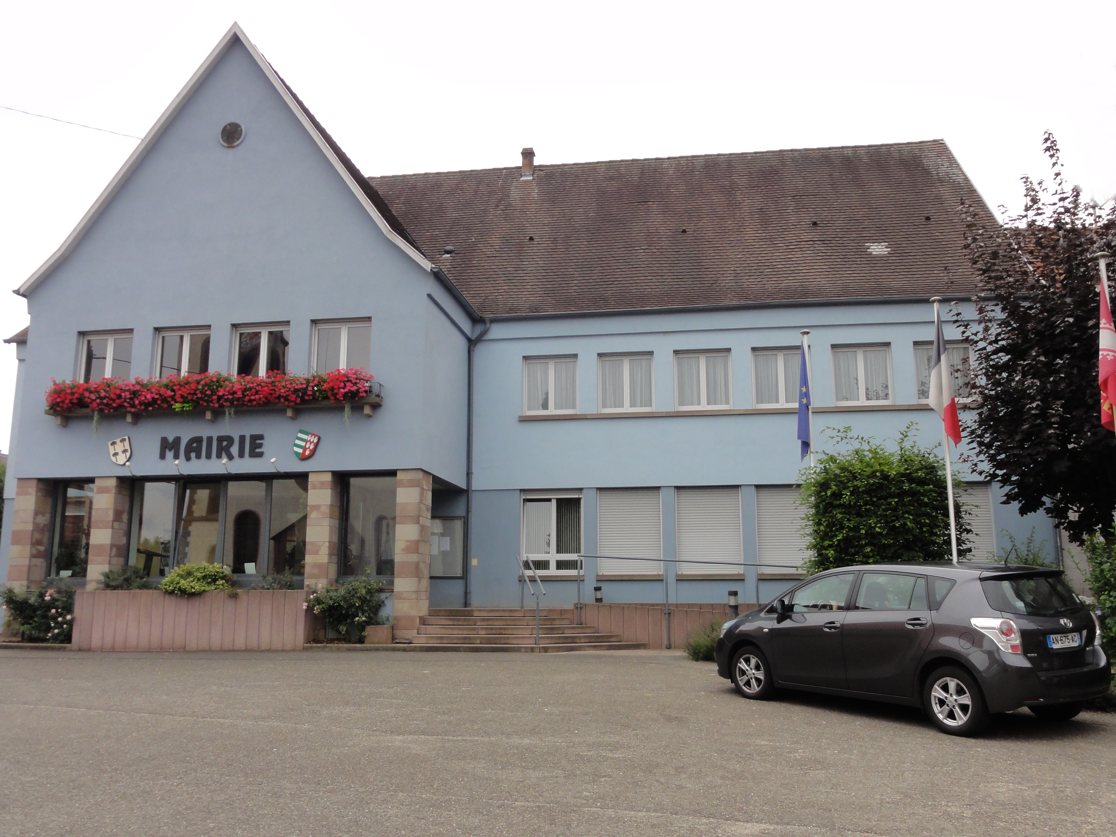 Alsace, Bas-Rhin, Obermodern, Mairie d'Obermodern-Zutzendorf.